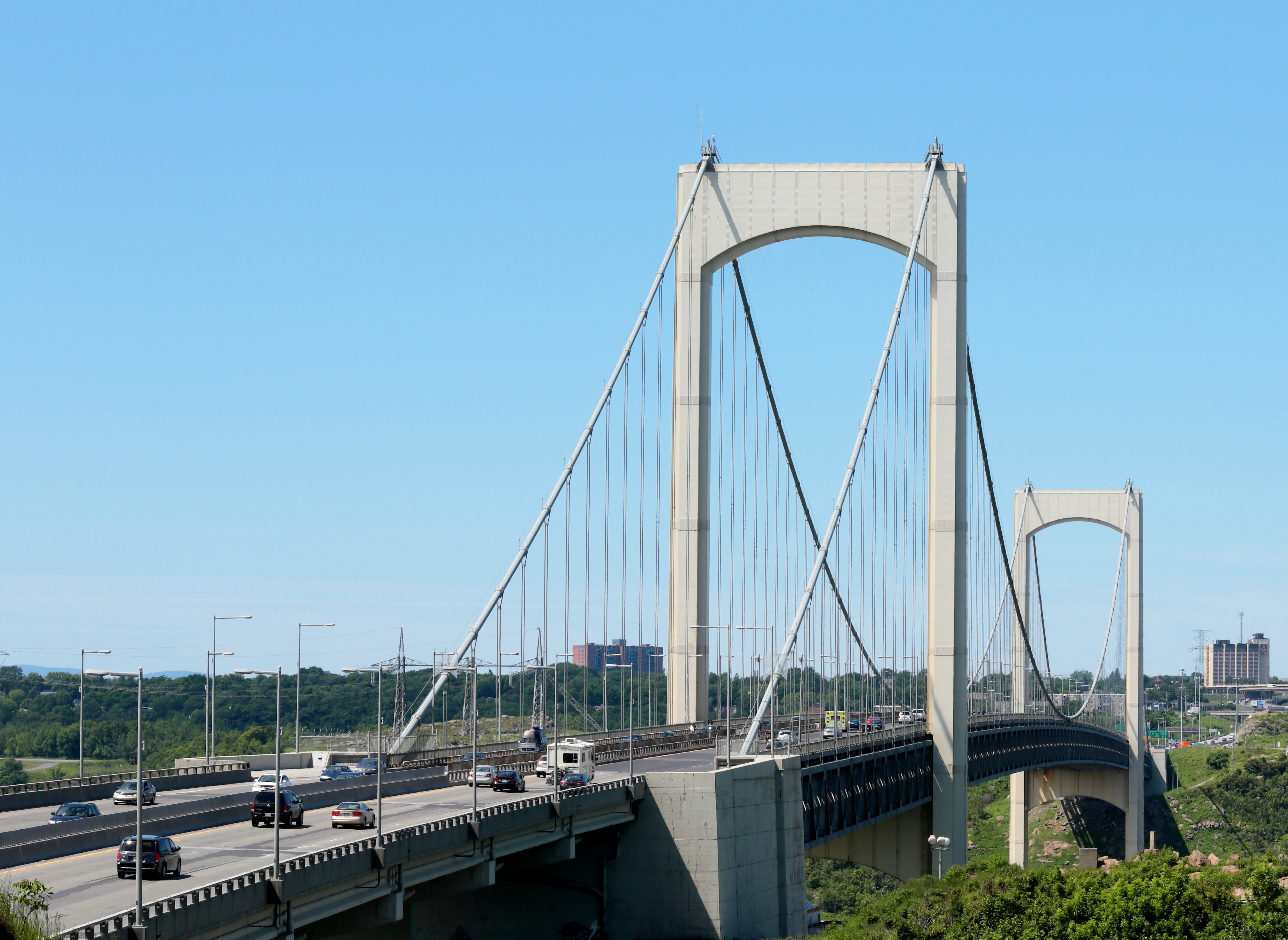 Le Pont Pierre-Laporte de Québec, photographié depuis la rive-sud du fleuve Saint-Laurent.